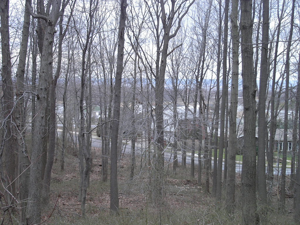 Todt Hill neighborhood overlook